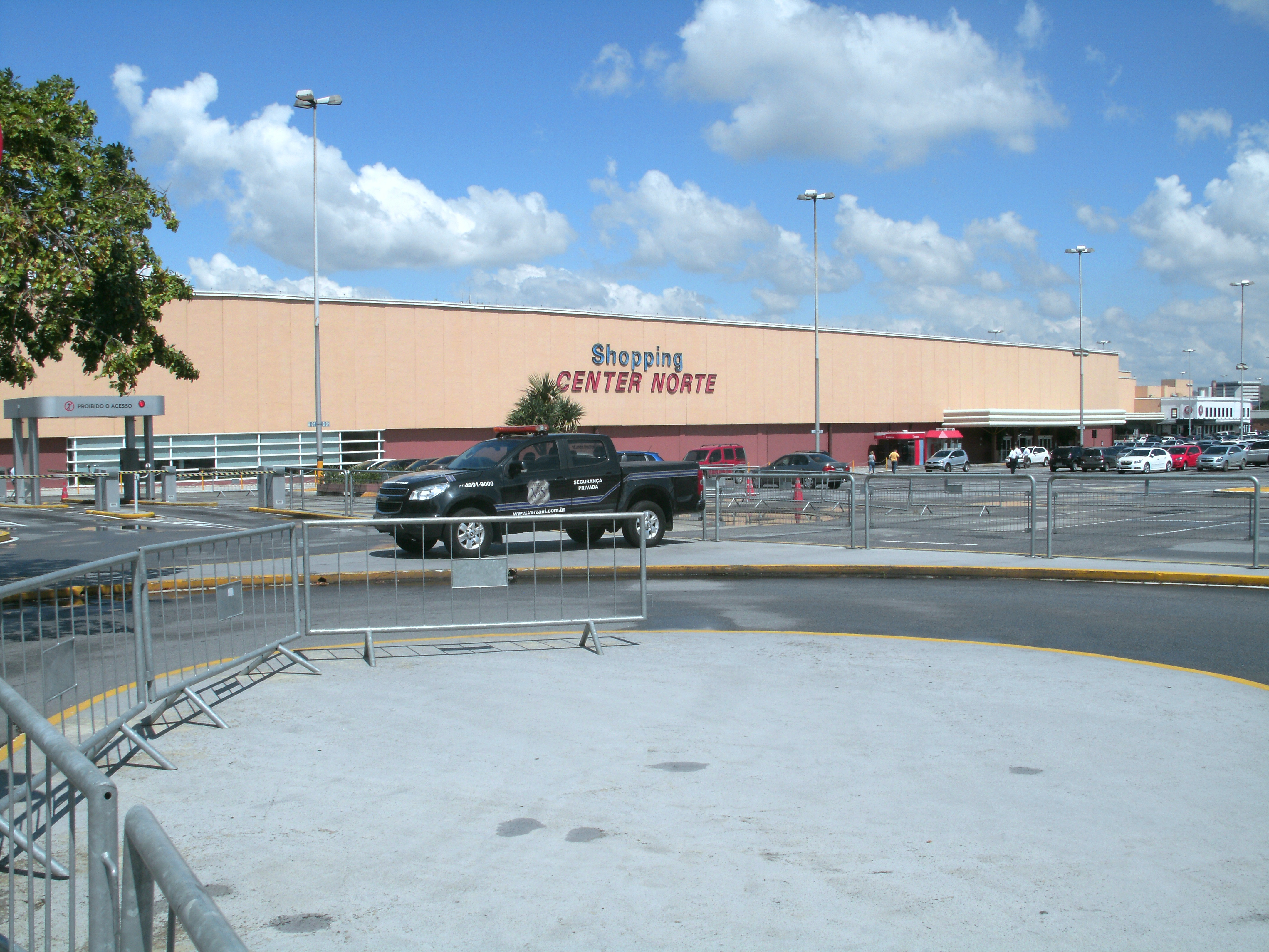 Shopping Center Norte - Travessa Casalbuono, 120